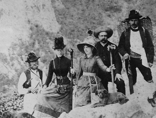 Ida Ferenczy (3. von rechts) neben Kaiserin Elisabeth bei einer Bergtour